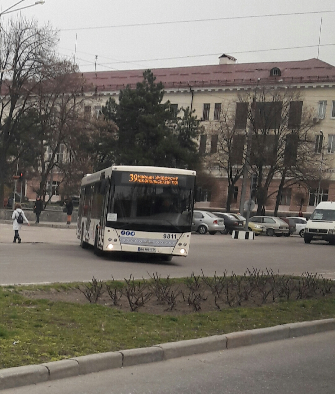 Запоріжжя. Майдан Університетський